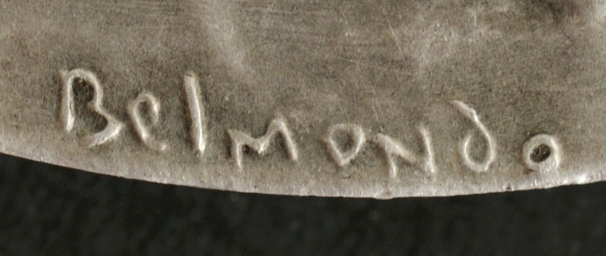 Signature de Paul Belmondo sur un médaille de présentation pour le centenaire de la compagnie Pechiney (1955), fabriquée en Aluminium.